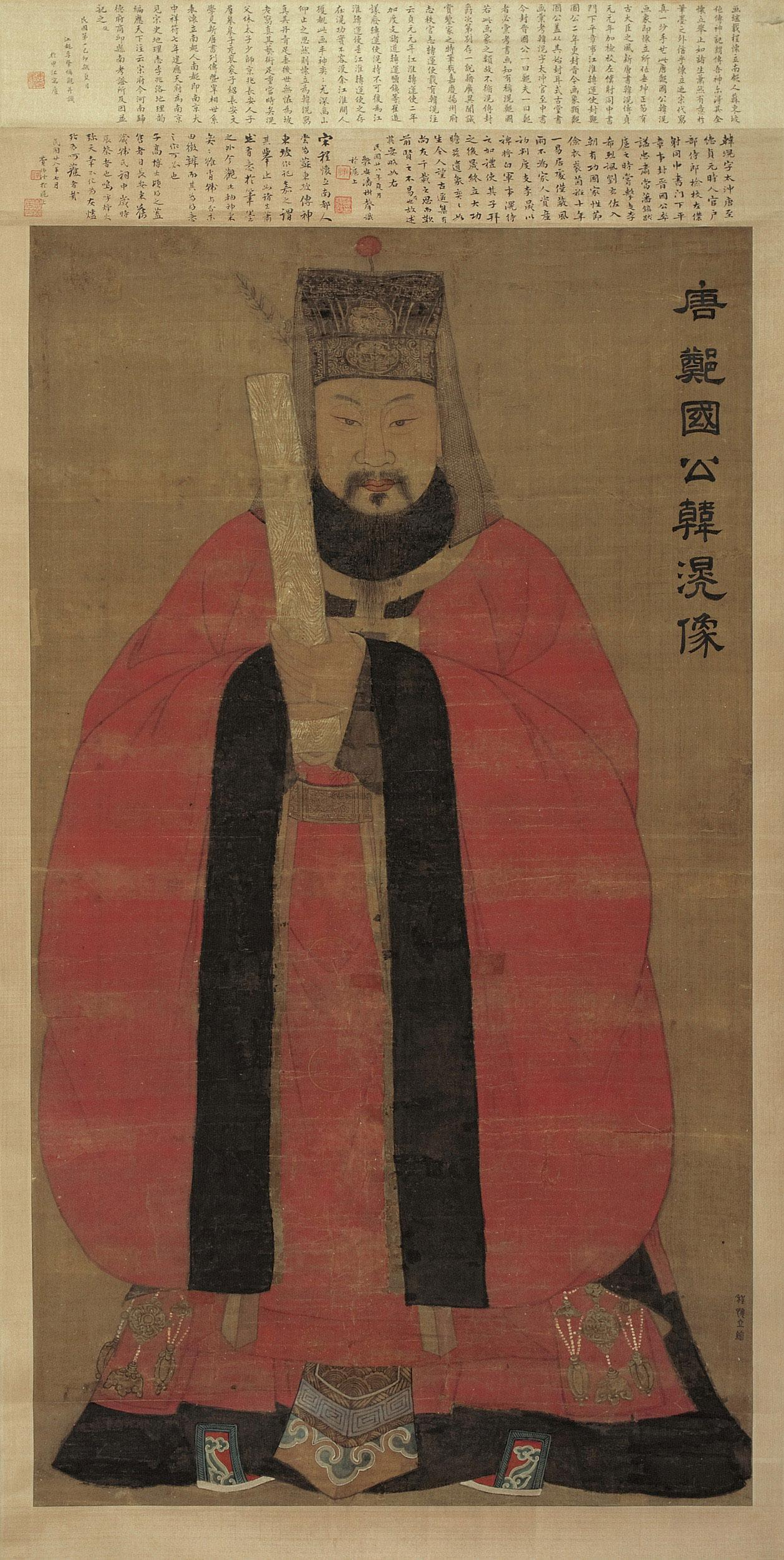 唐鄭國公韓滉像